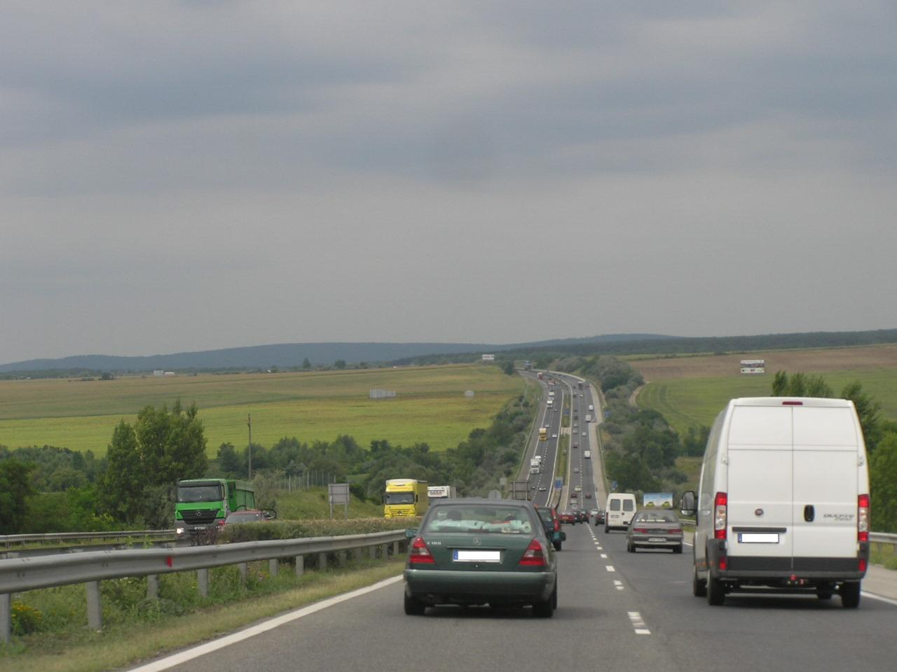 Ansicht auf der Autobahn M1 nach Budapest in Richtung Tatabánya, Ungarn